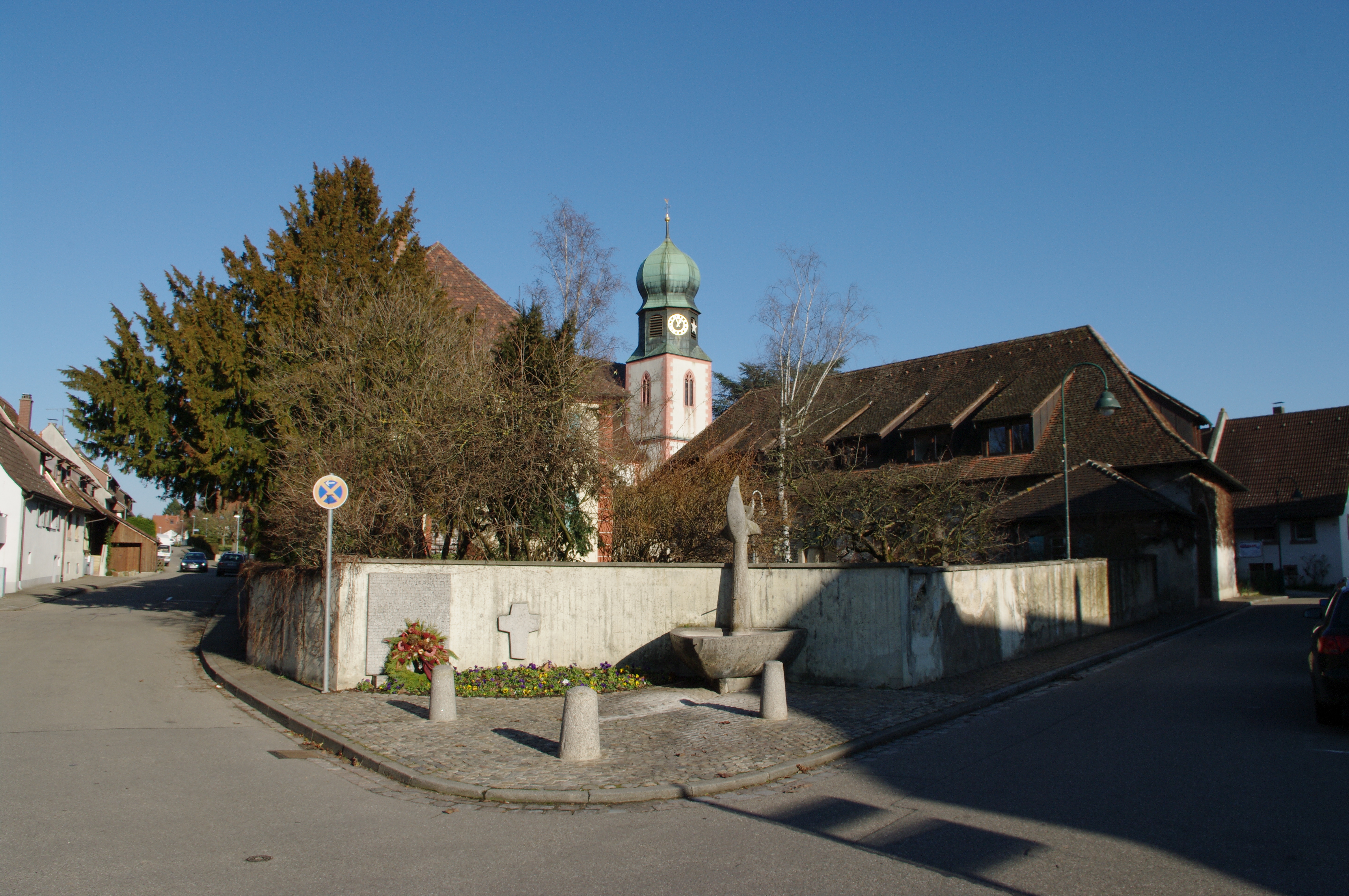 Blick auf das Pfarrgelände von St. Cyriak